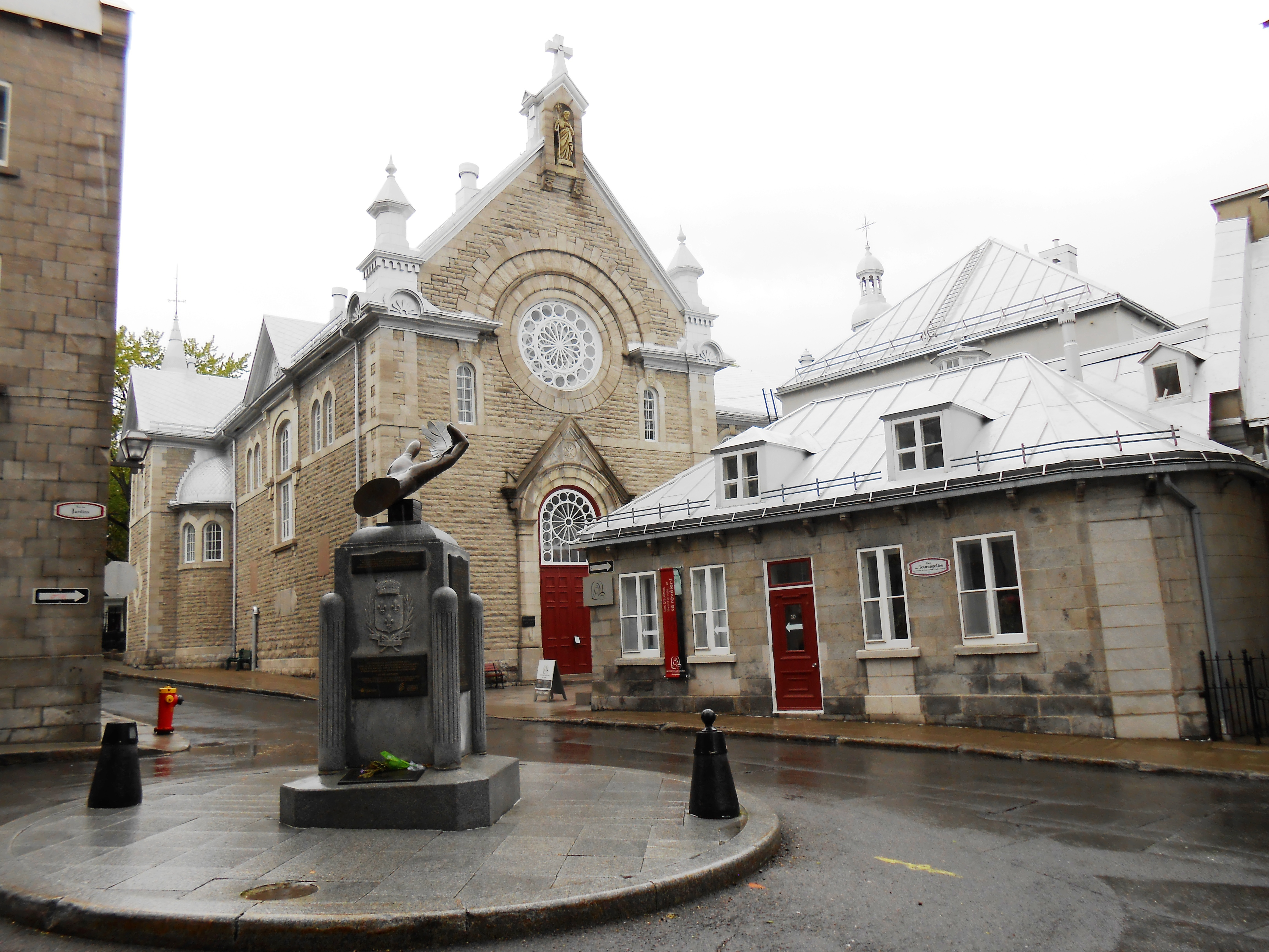 Musée des Ursulines, Haute-Ville du Vieux-Québec